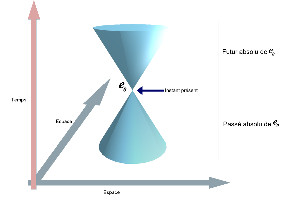 Cône de lumière de e0.